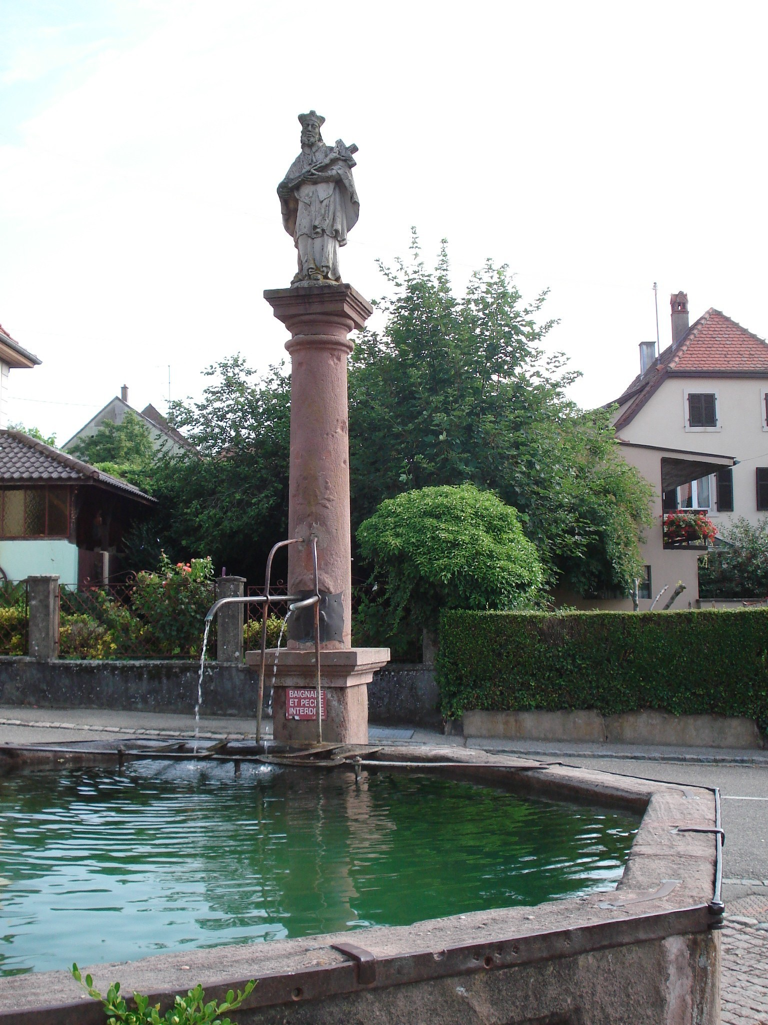 Fontaine St Népomucène Wattwiller